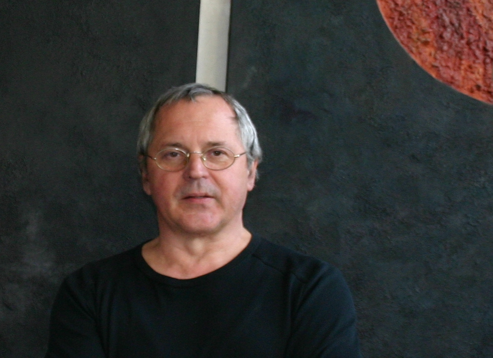 Potraitaufnahme von Gutruf